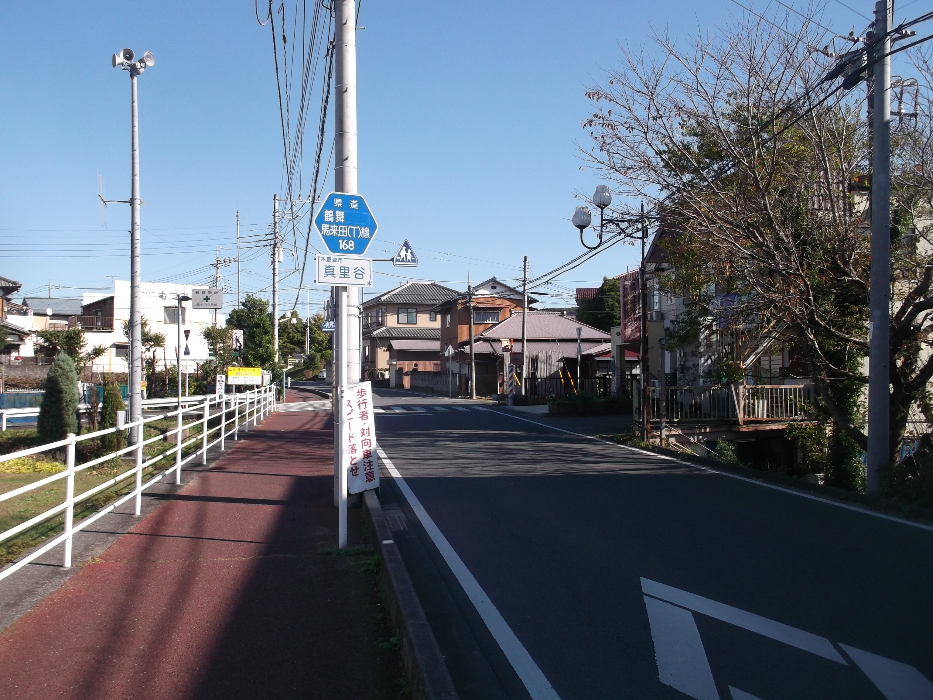 千葉県道168号鶴舞馬来田停車場線 千葉県木更津市真里谷